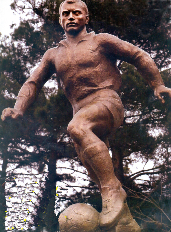 Sculpture of Mokhail Meskhi